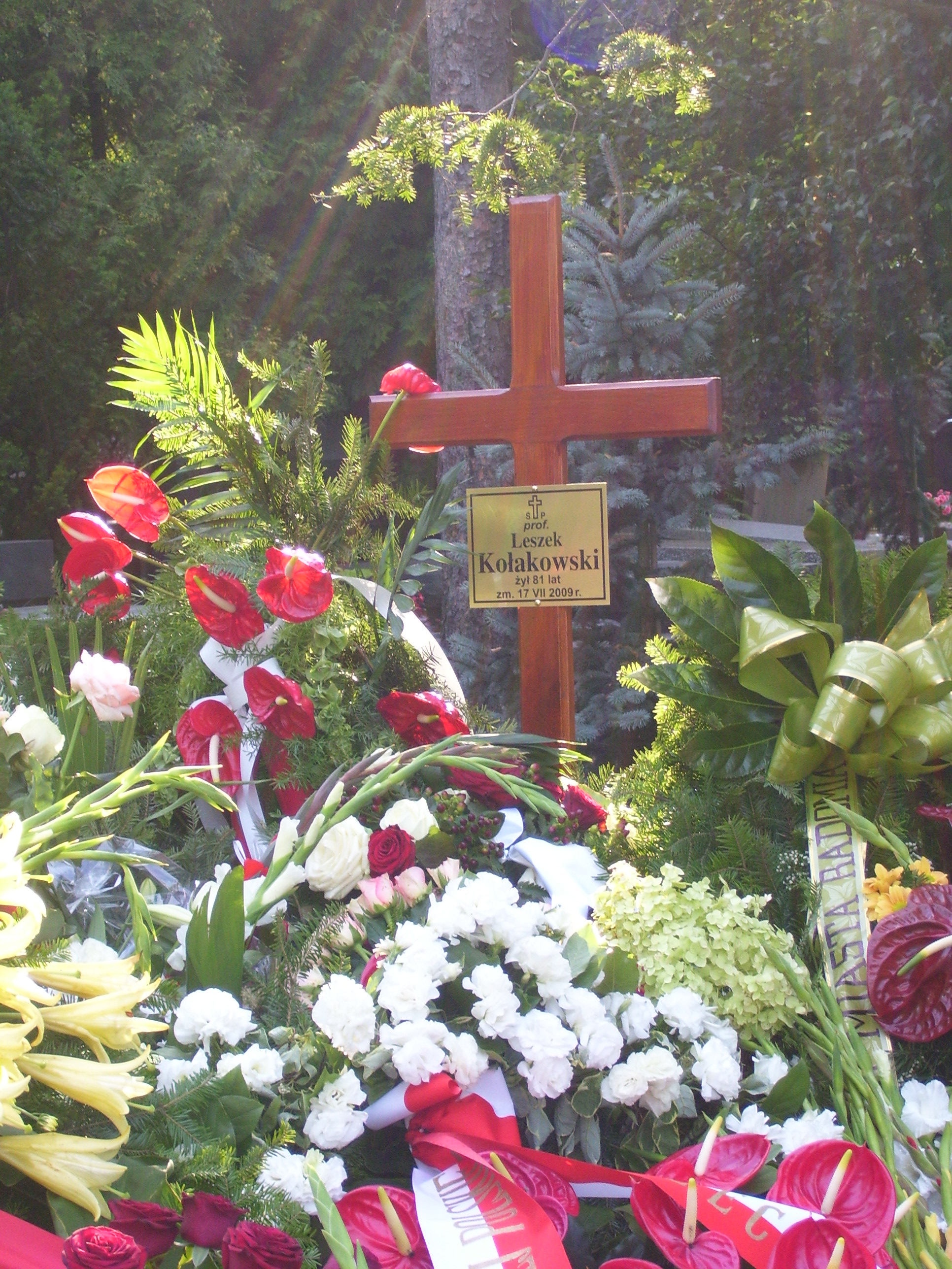 Grób Leszka Kołakowskiego